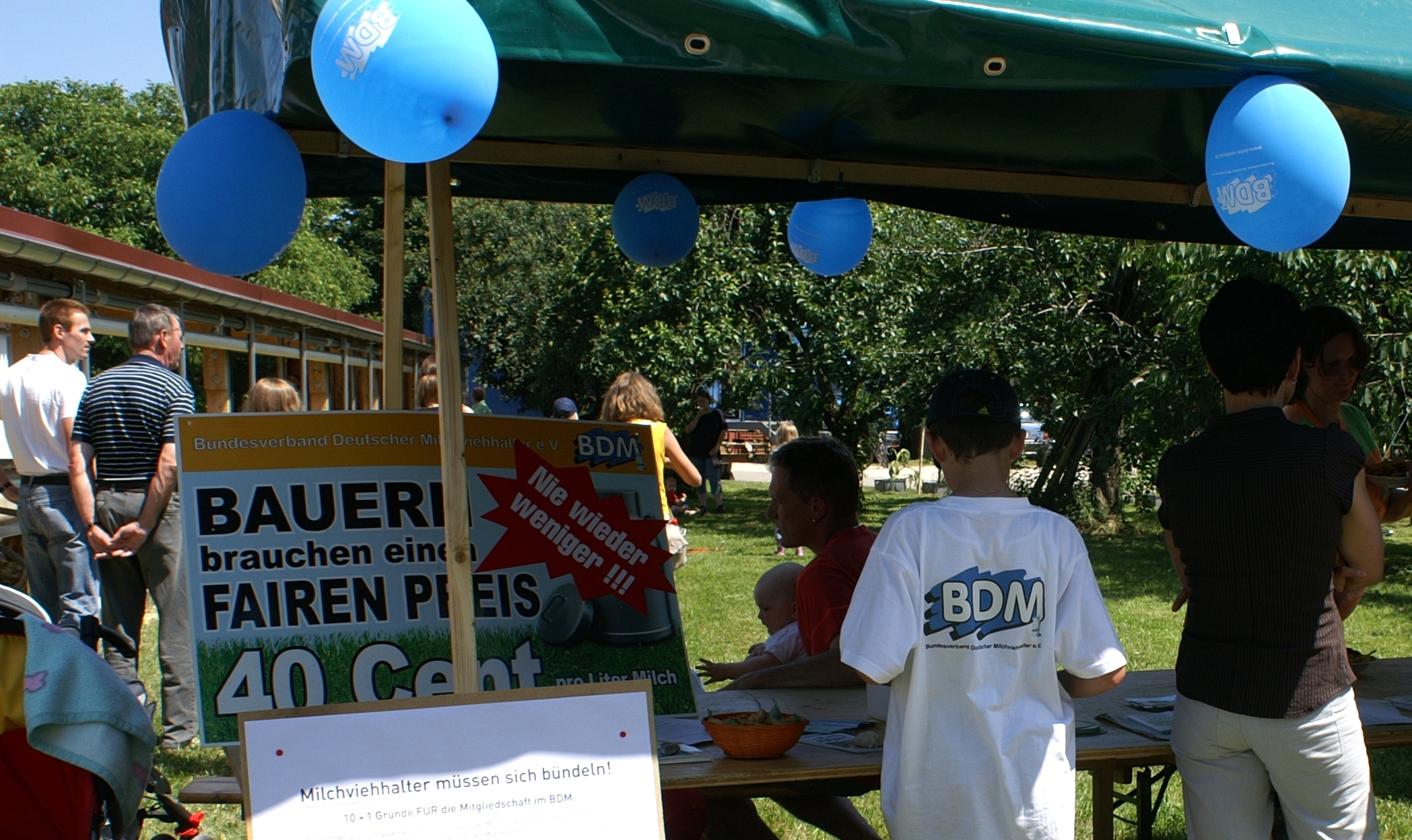 Der Bundesverband Deutscher Milchviehhalter e.V. beim "Tag des offenen Hofes" im Rahmen der Gläsernen Produktion.